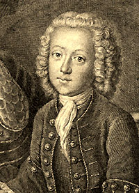 "Jean-Philippe Baratier présenté par Minerve" (1721–1740), German scholar.